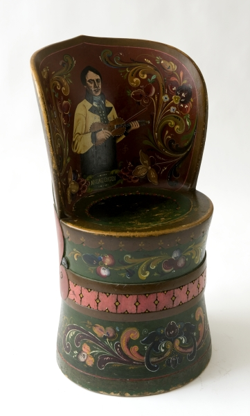 Kubbestol, skåret og malt av Olav Fyrileiv, Telemark. Norsk Folkemuseum, Oslo, NF.2010-0695